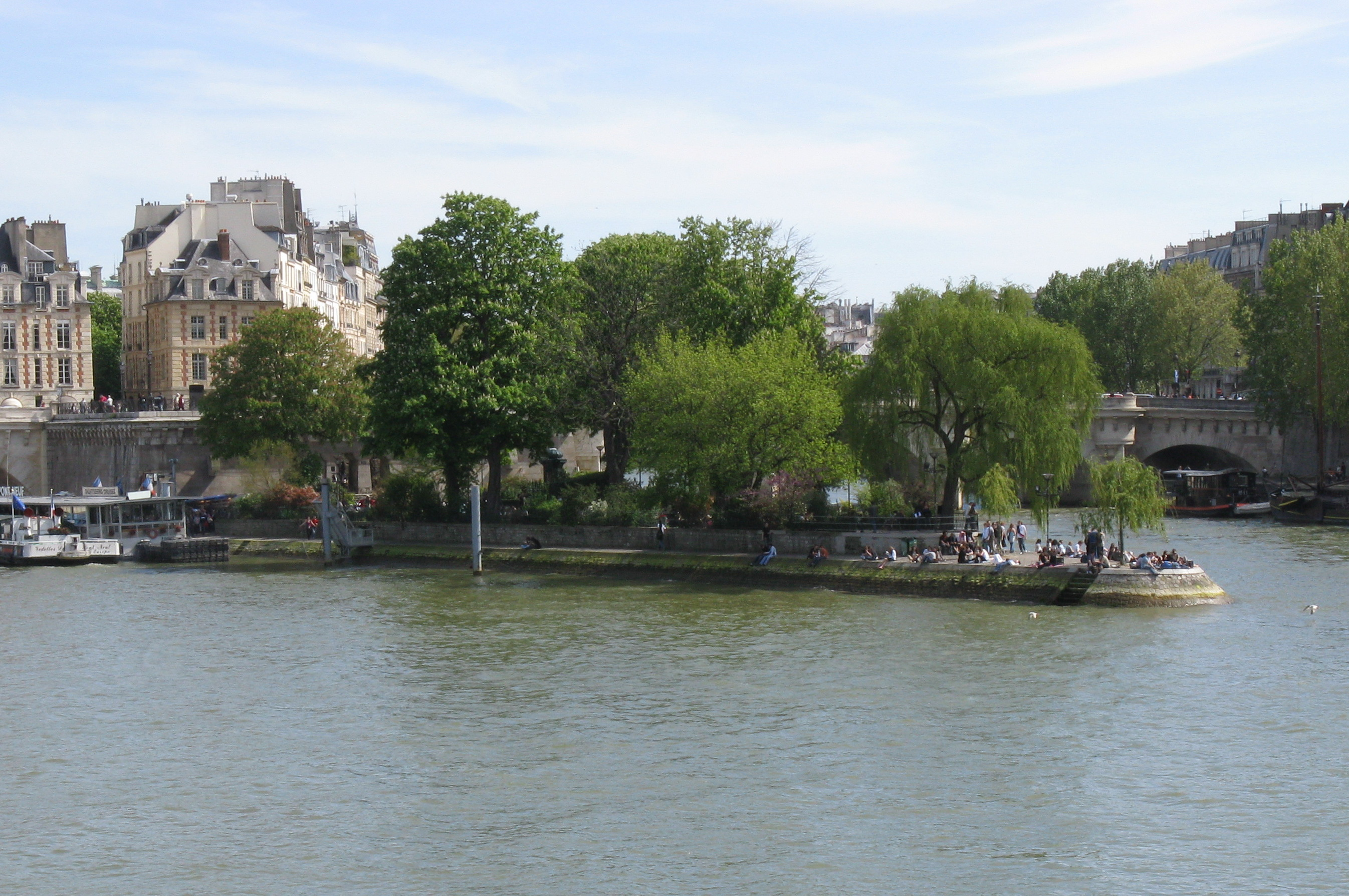 The square du Vert-Galant, on the île de la Cité, Paris, France